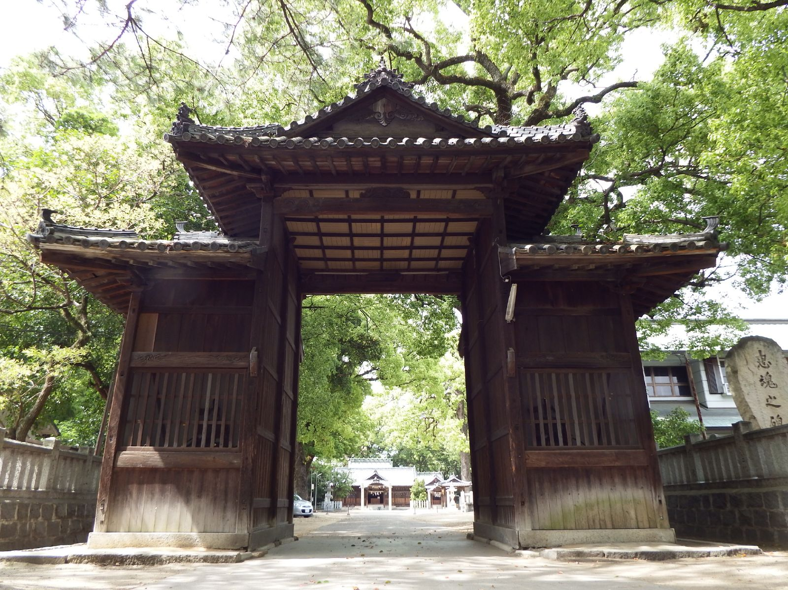 新居浜の一宮神社の随神門